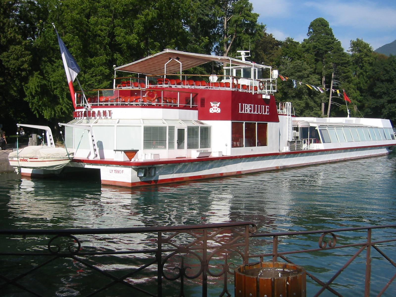 Le Libellule à Annecy, France. Barge number LY 1590F.